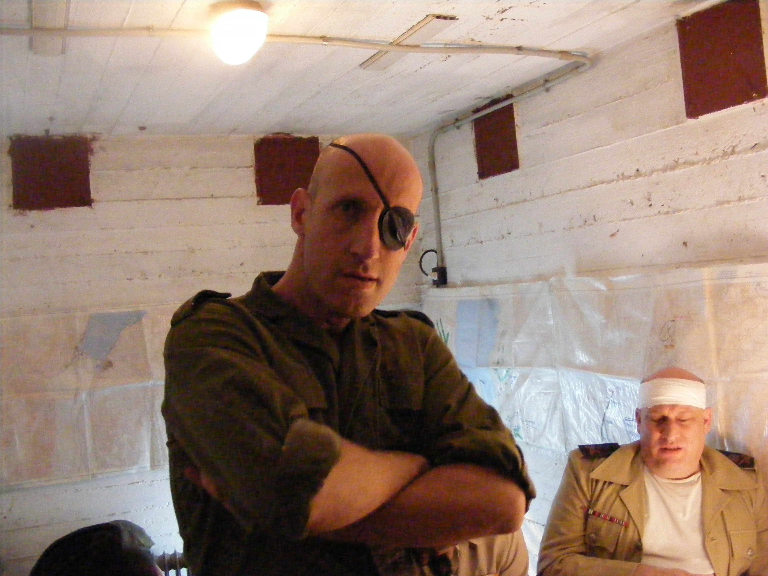 ערן שדר בקליפ פול על הגבעה 2011